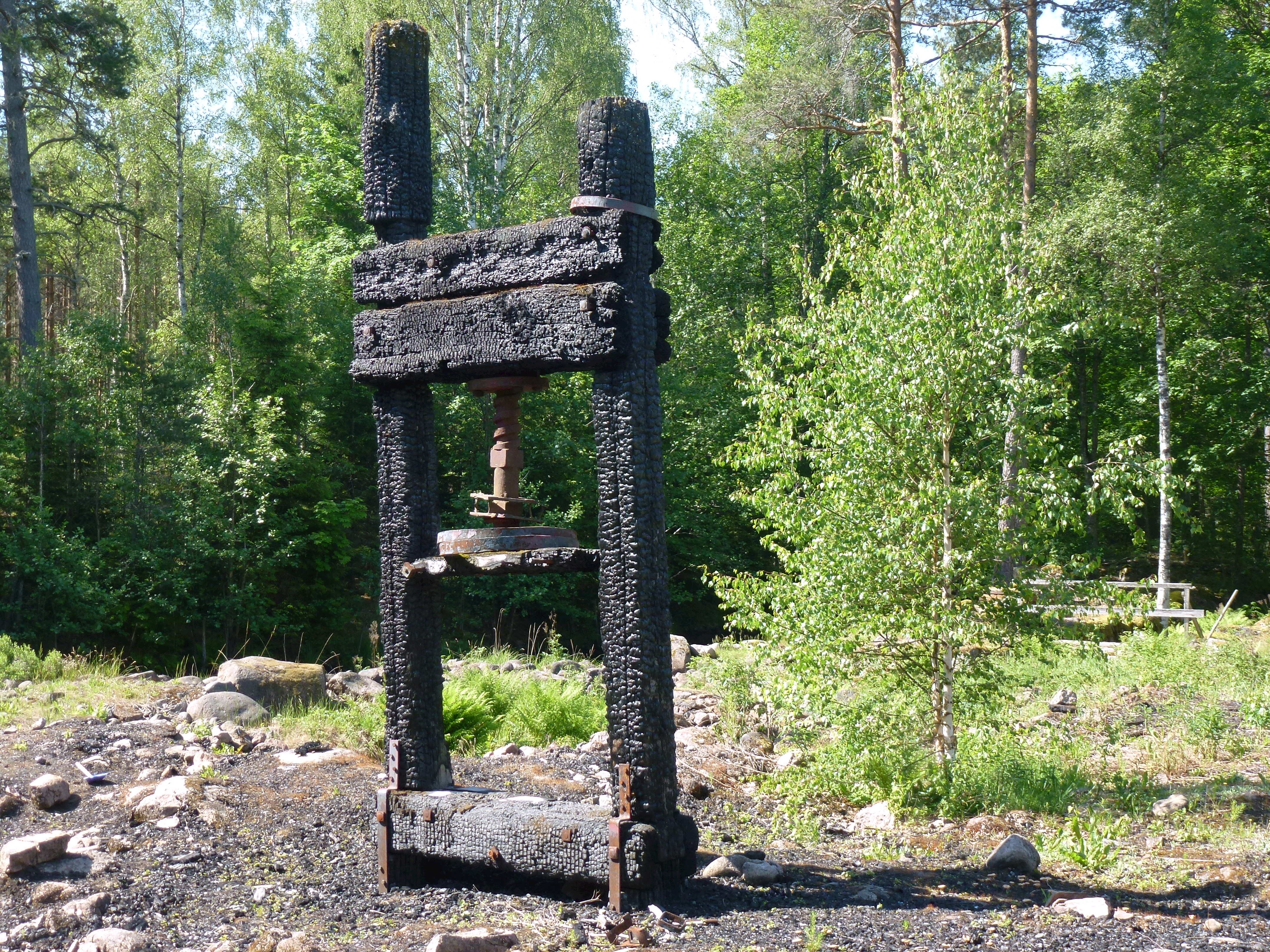 Ösjöfors handpappersbruk, den nedbrunna fabriksbyggnaden